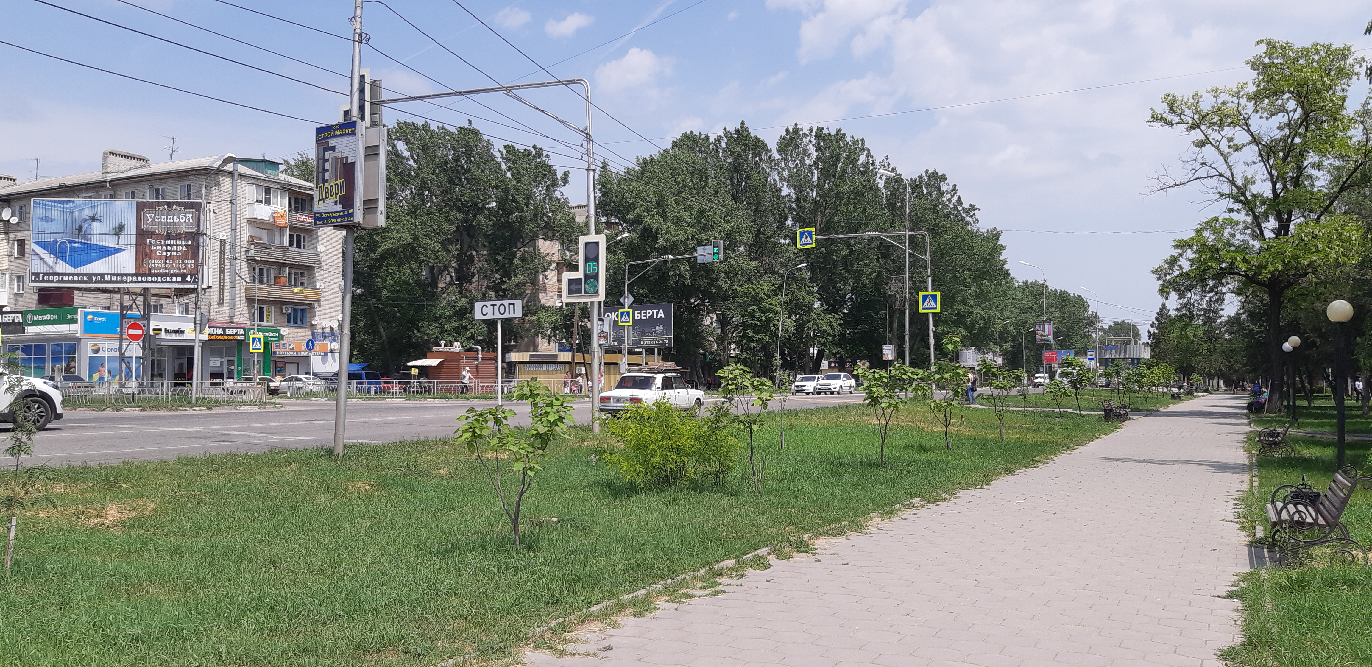 Калинина - Центральная улица Георгиевска